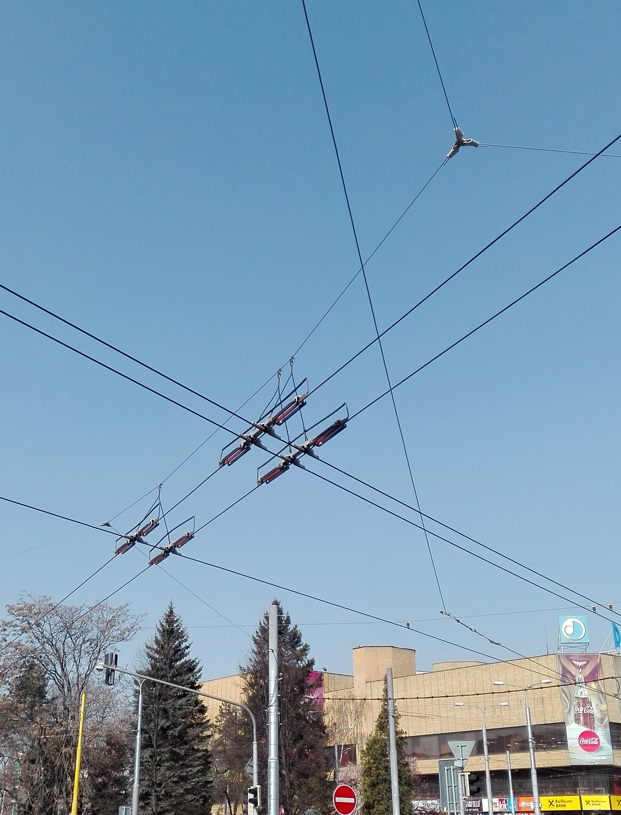 Kríženie trolejbusovej a električkovej stopy na Námestí osloboditeľov, Košice, 2016